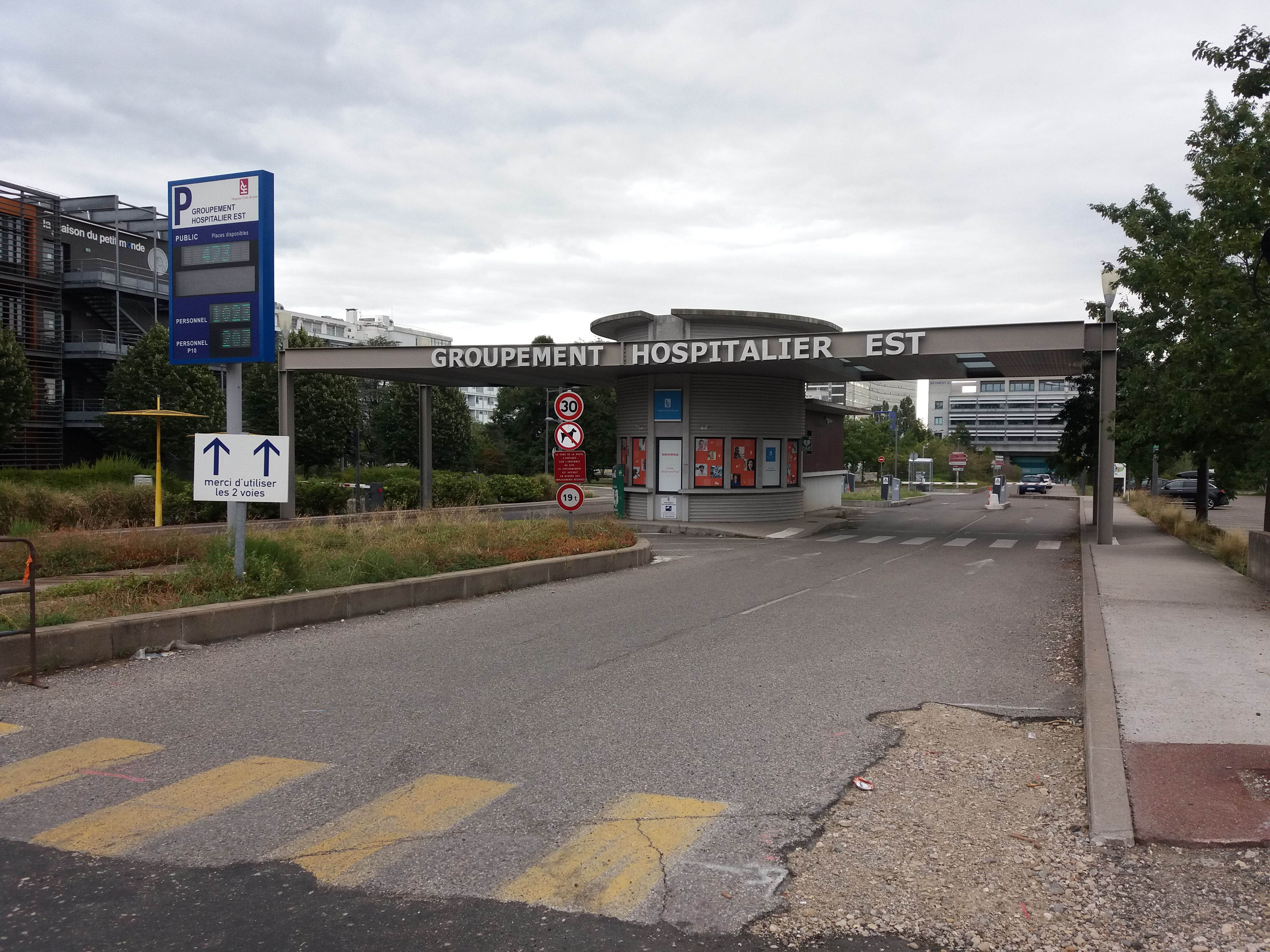 Entrée nord.